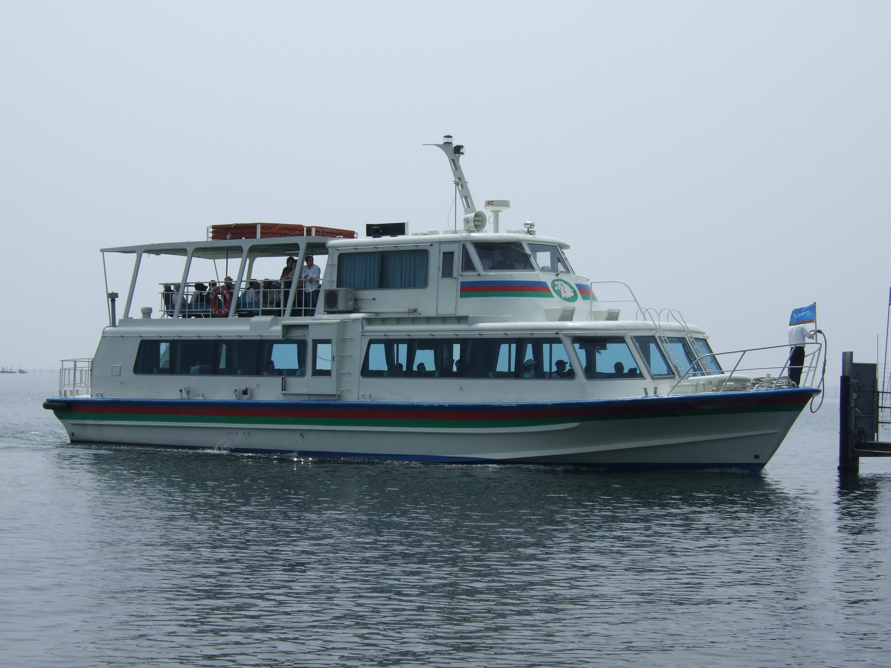 びわ湖観光船オーミマリン第5わかあゆ